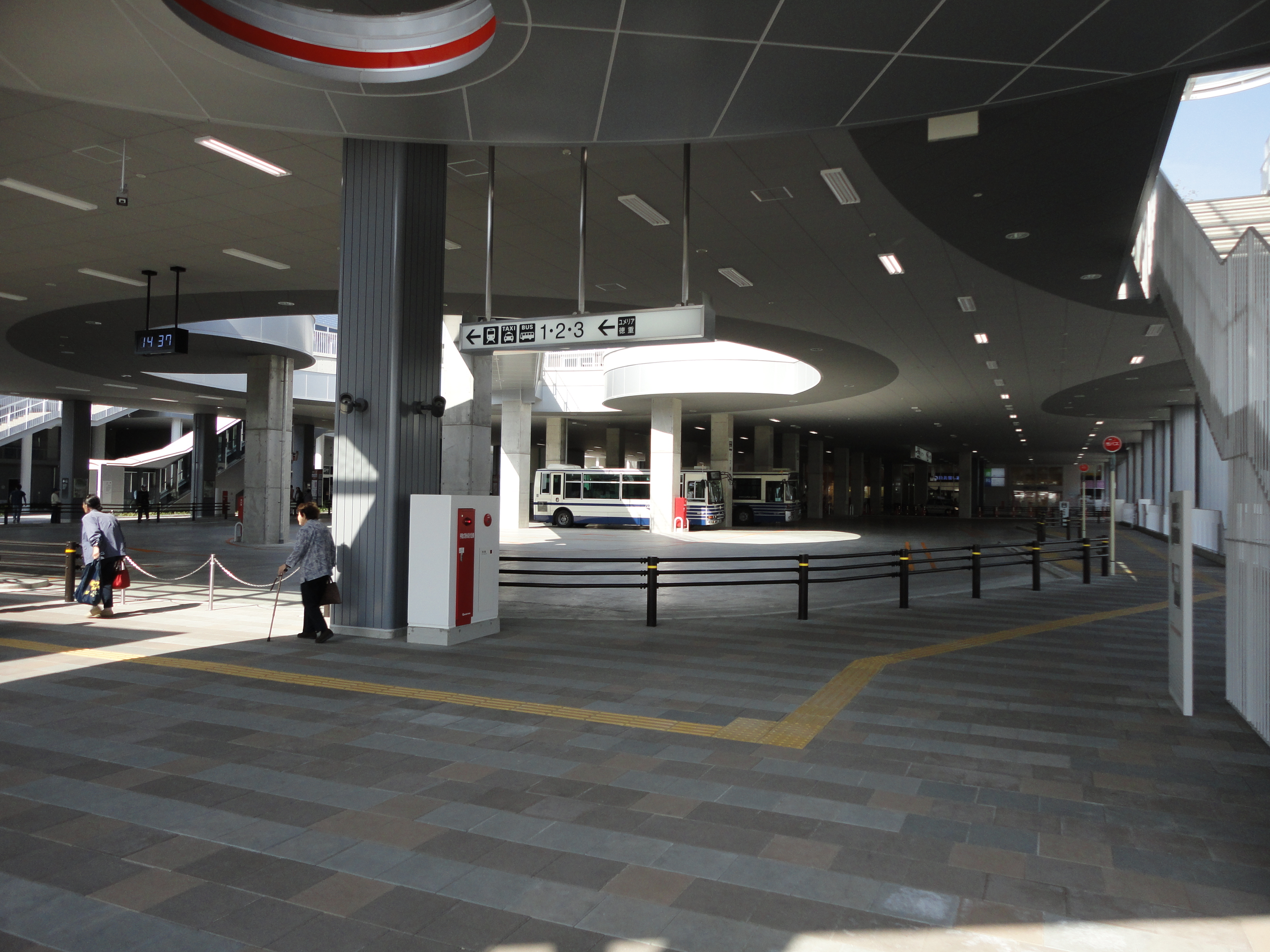 徳重